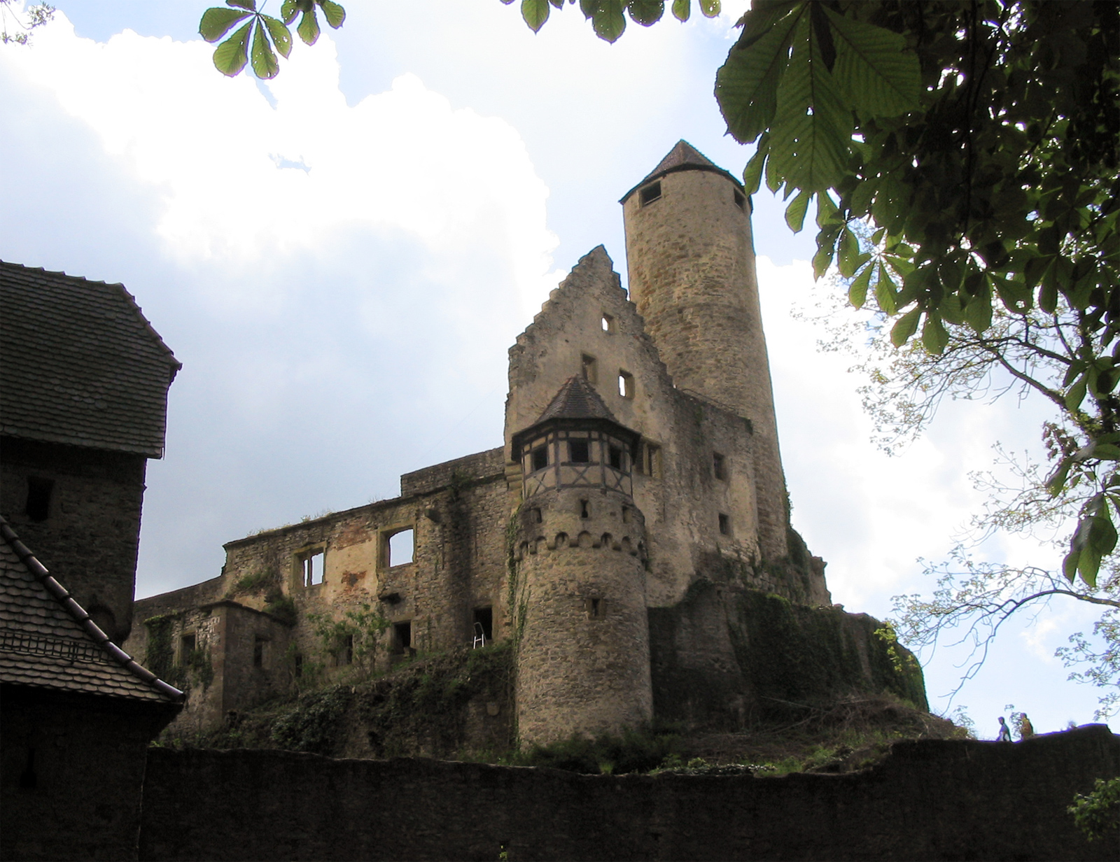 Rückseite von Burg Hornberg